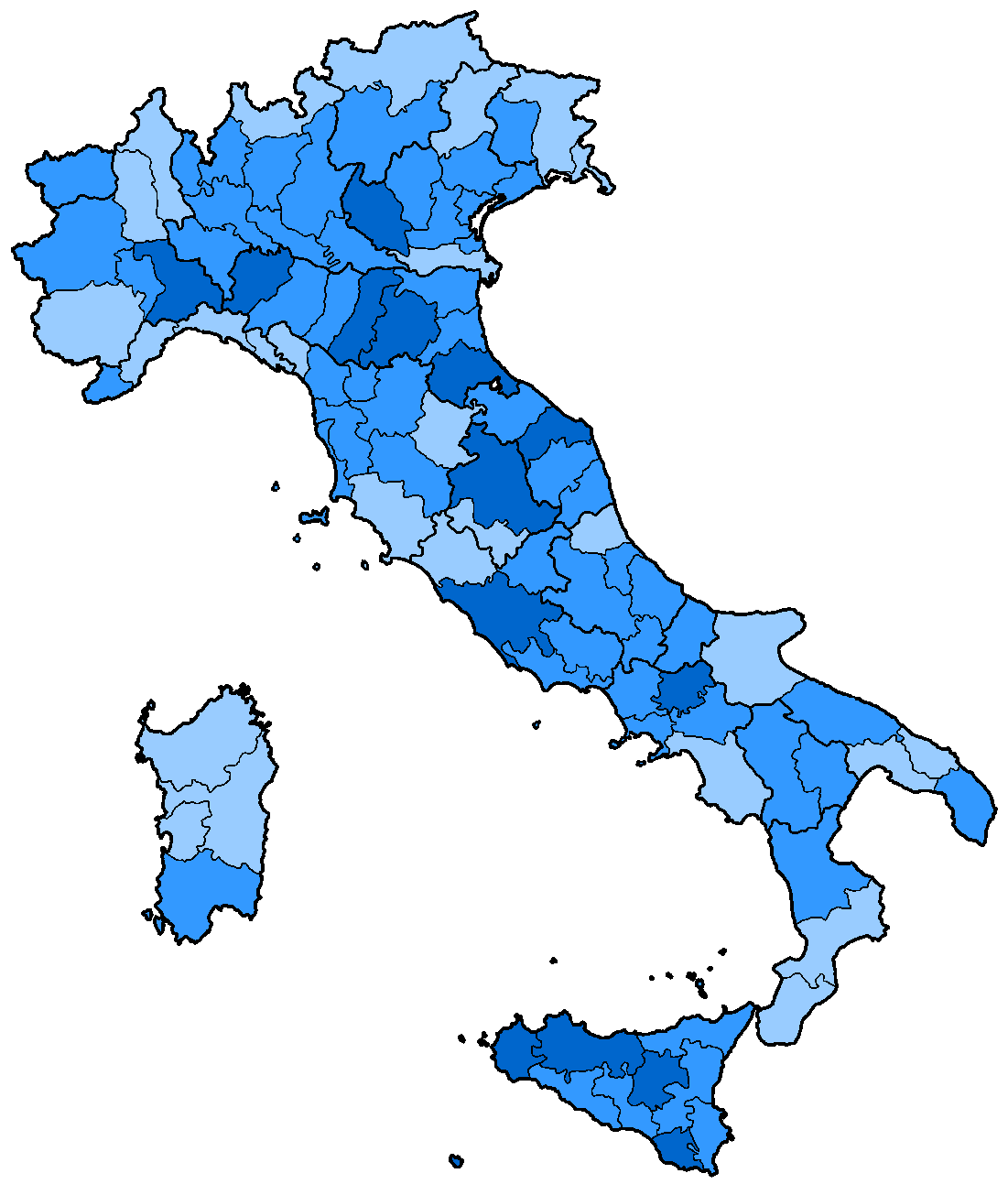 Durezza dell'acqua nelle province italiane (anni '80, carta Coop) acqua dolce acqua media acqua dura